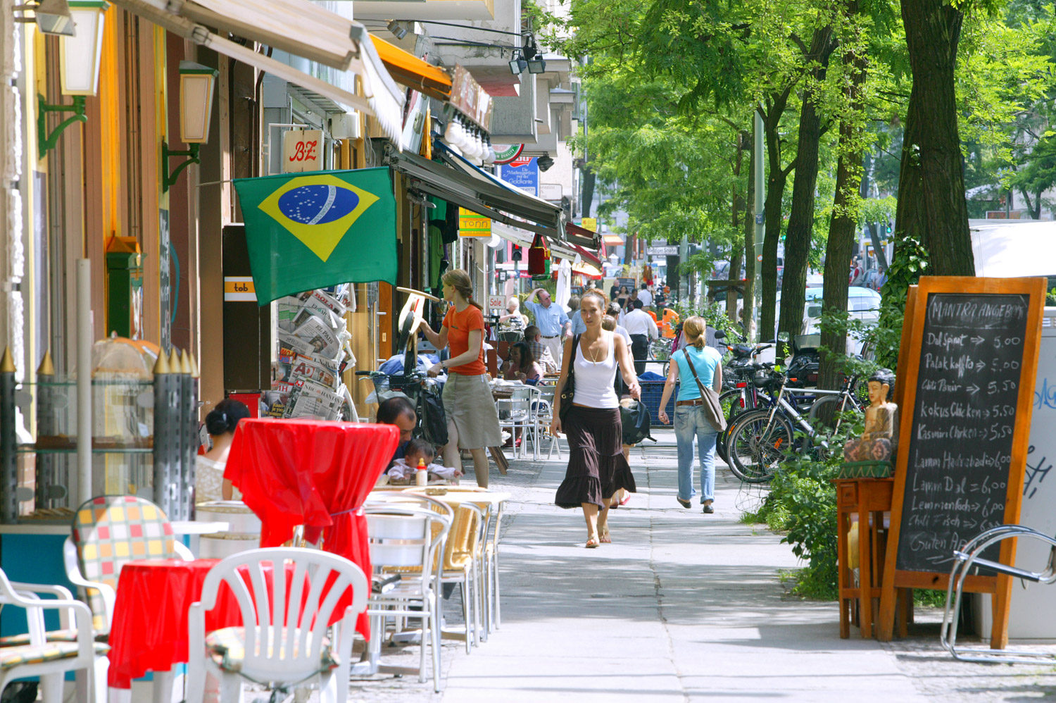 Berlin Schoeneberg Akazienstrasse